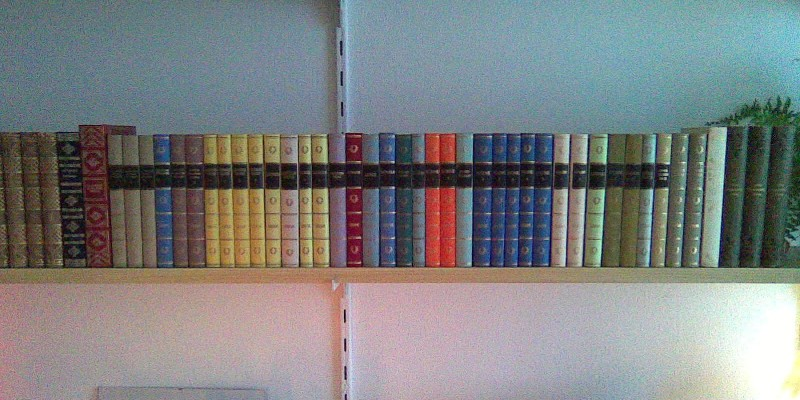 Einige Bände der "Bibliothek Deutscher Klassiker"-Reihe des ostdeutschen Aufbau Verlages.